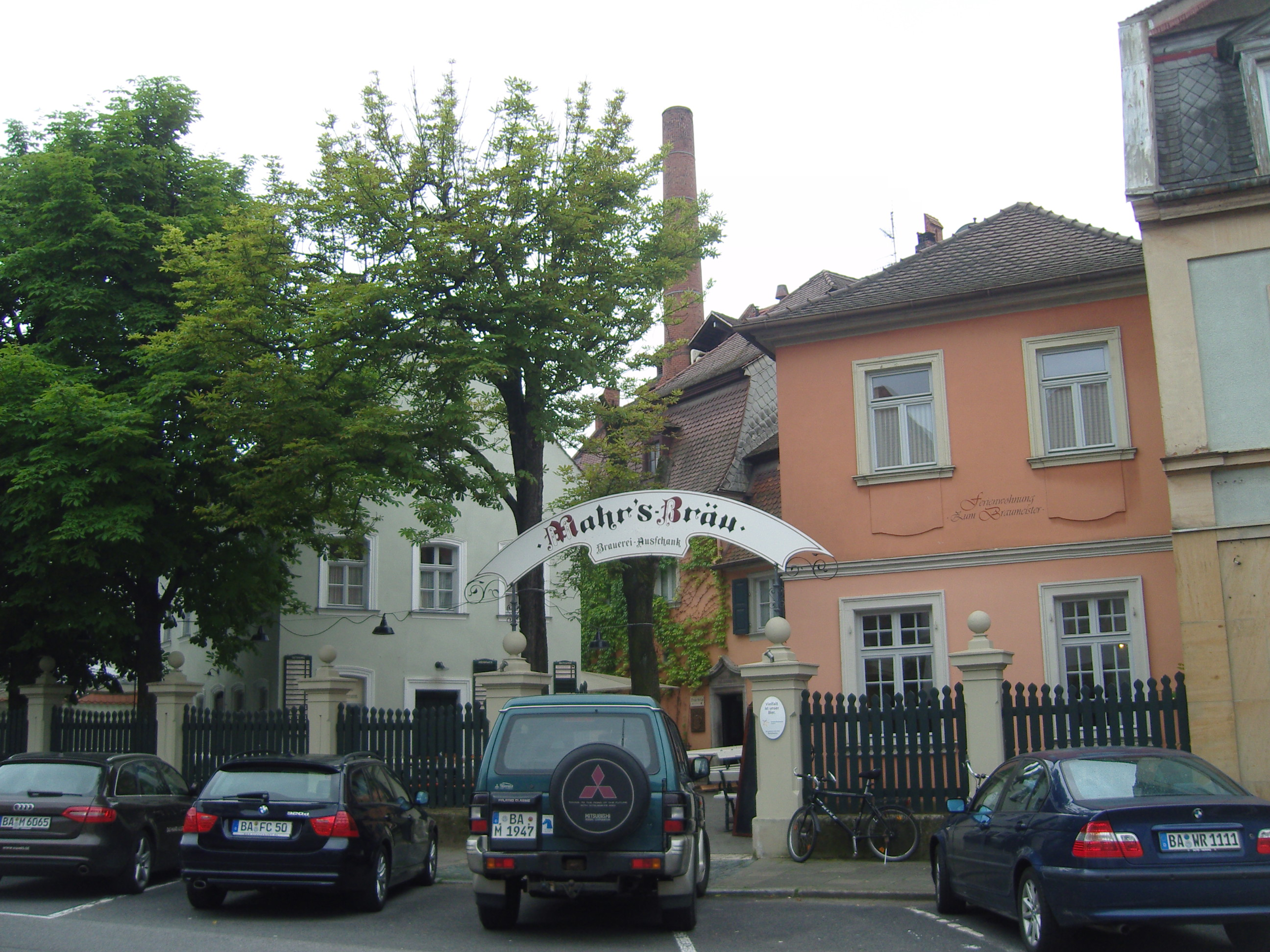 Denkmalgeschütztes Brauhaus Mahr in der Wunderburg 10 in BambergThis is a photograph of an architectural monument.